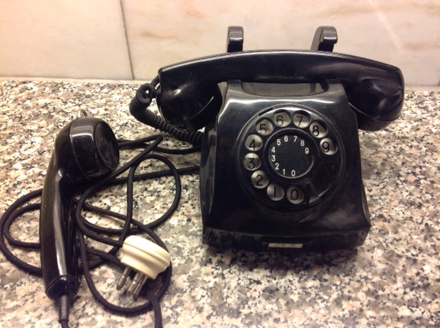 Telefon designet for Elektrisk Bureau av Arne E. Holm. Konstruert av ing. Bjerknes. Telefonen skulle både kunne stå på et bord og henge på veggen